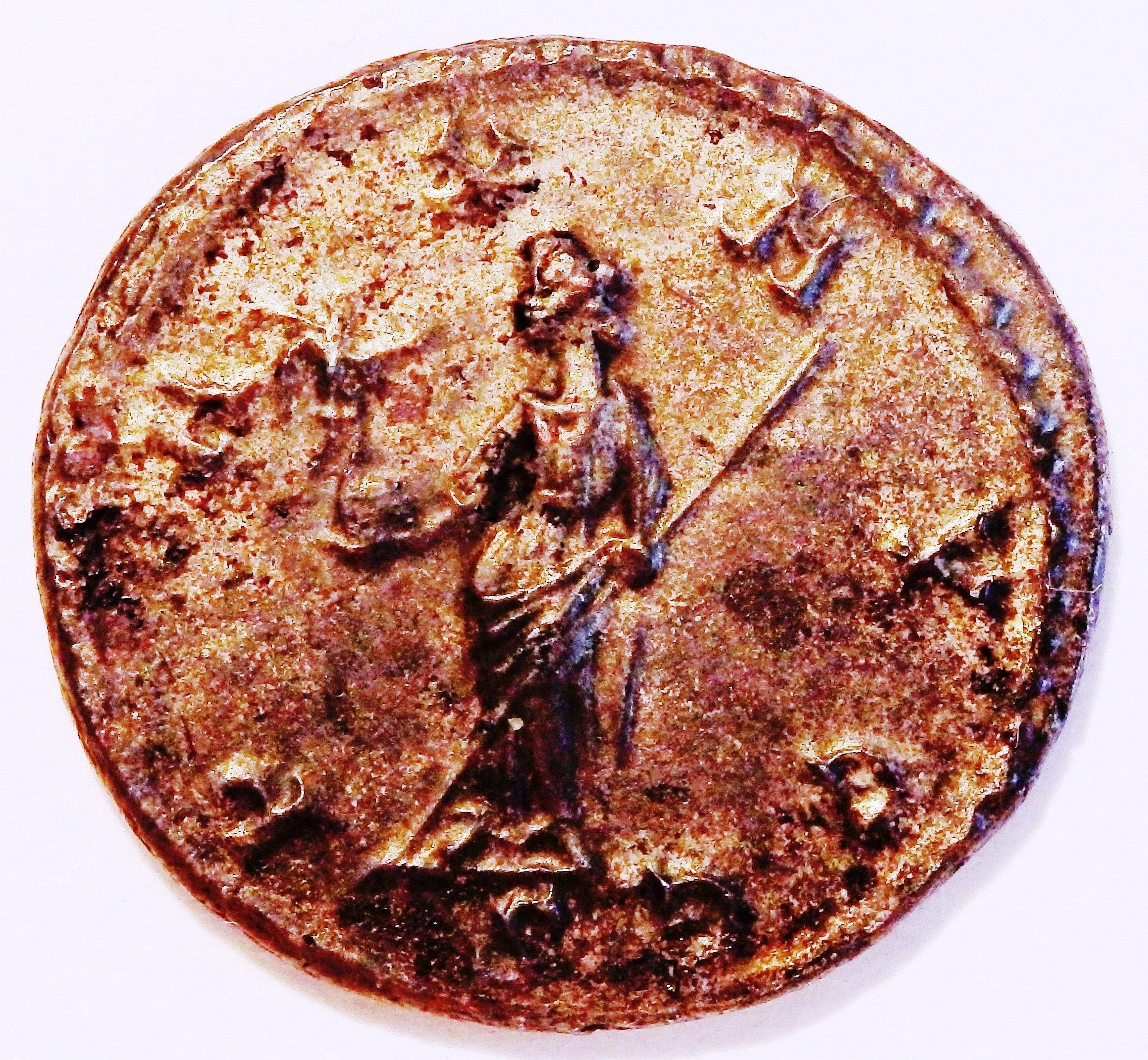 PAX AVGG auf Rückseite eines Antoninian des Kaisers Maximianus, Kampmann 120.41